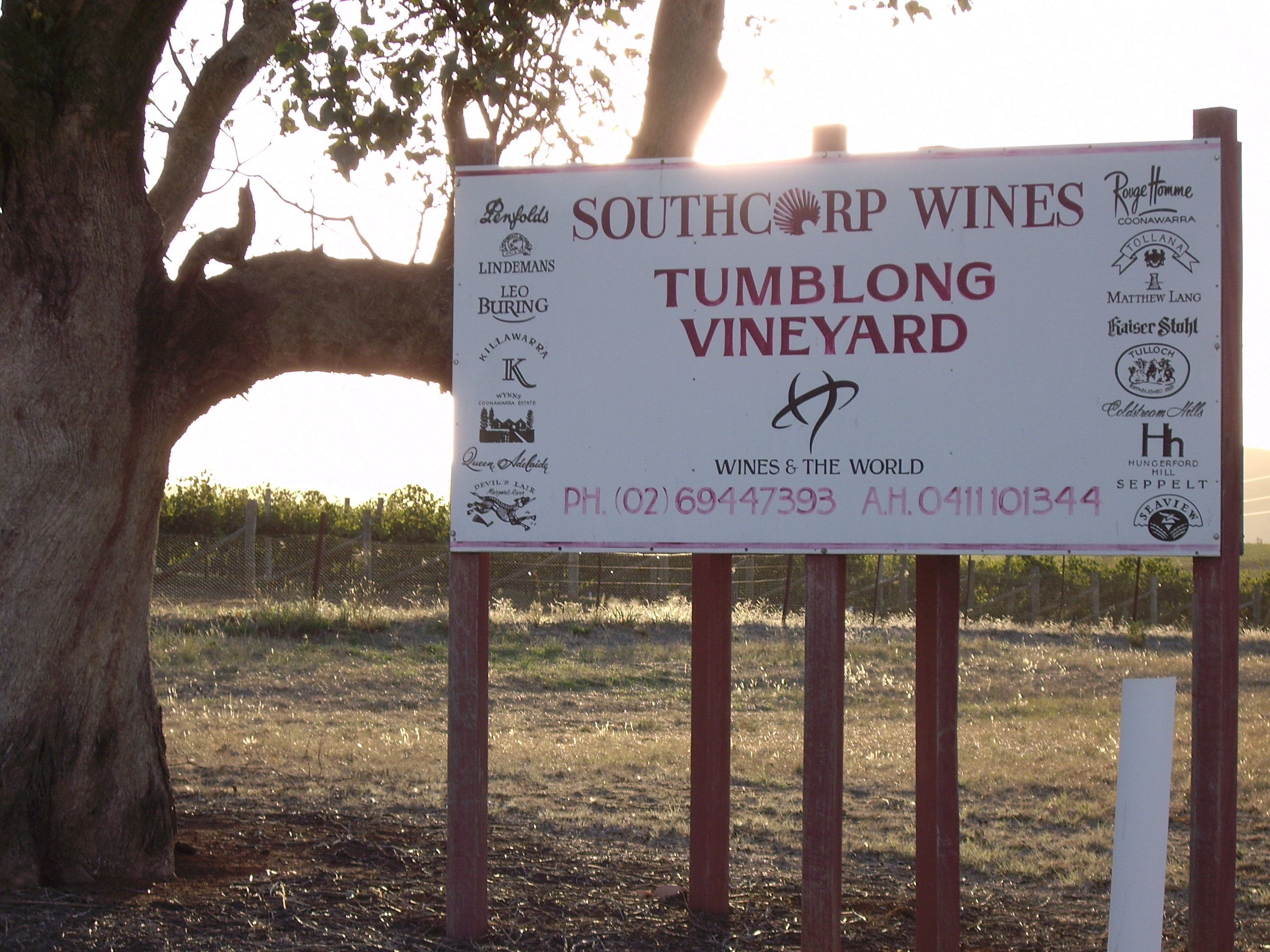 Tumblong Vineyard